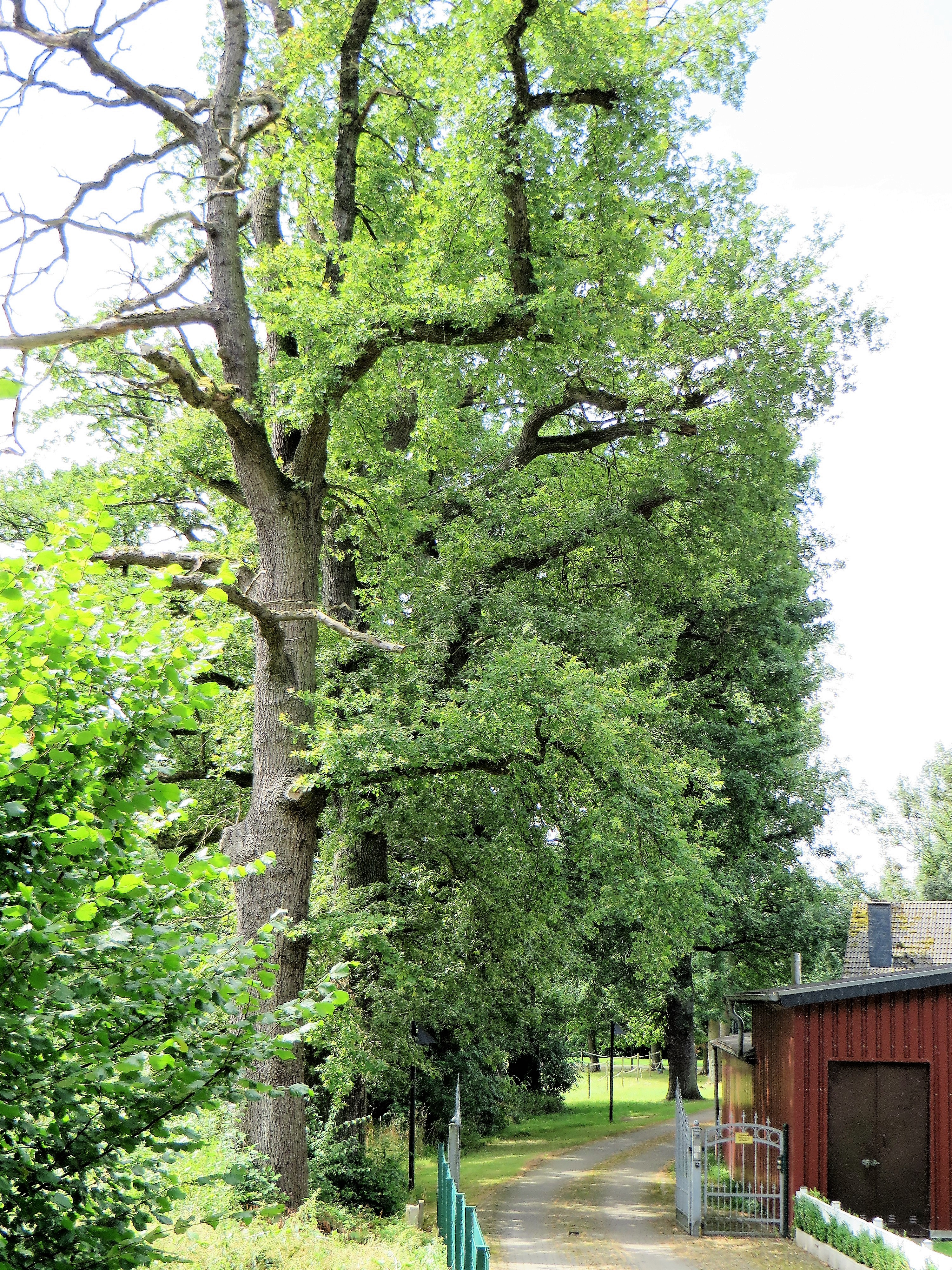 Geschützter Landschaftsbestandteil „Hof Reh“ im Hagener Stadtteil Hohenlimburg, Ortsteil Reh, Wannebachstraße. Es handelt sich um eine ca. 100 bis 250-jährige Baumgruppe/-reihe bestehend aus 3 Blutbuchen, 10 Ahornbäumen, 10 Eichen und 2 Eschen mit einem Stammumfang von ca. 3 m und ca. 20 m Höhe sowie um den Teich an dem ehemaligen Bauernhof Reckermann-Gälger. Der Bereich liegt im Landschaftsschutzgebiet „Berchumer Heide, Reher Heide“.